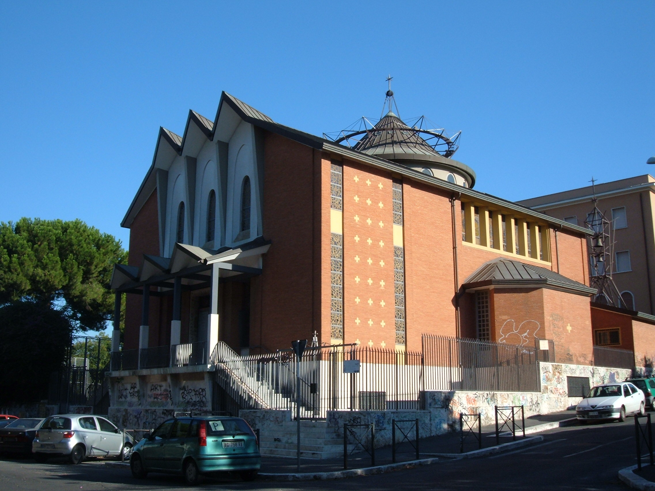 Chiesa della Sacra Famiglia, a Roma, nel quartiere Ostiense, in via David Salinieri.